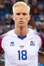 Сборная Исландии уступает Хорватии и покидает ЧМ-2018